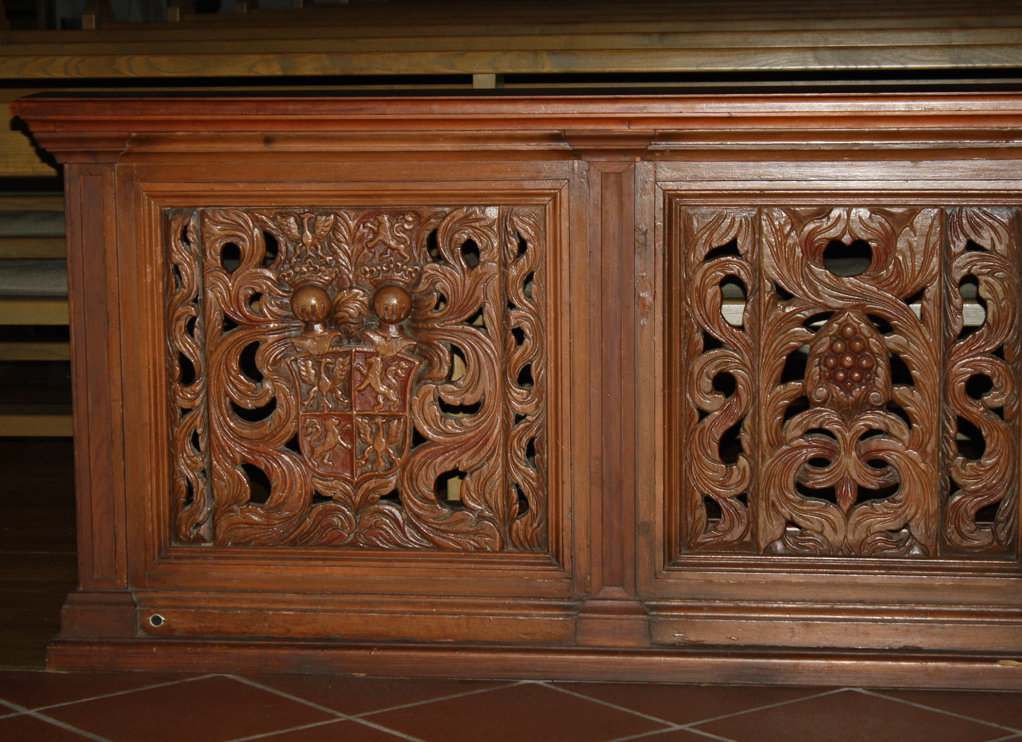 Kommunionbank mit Stifterwappen (von Sohlern)Pfarrkirche Wiesbaden - Frauenstein